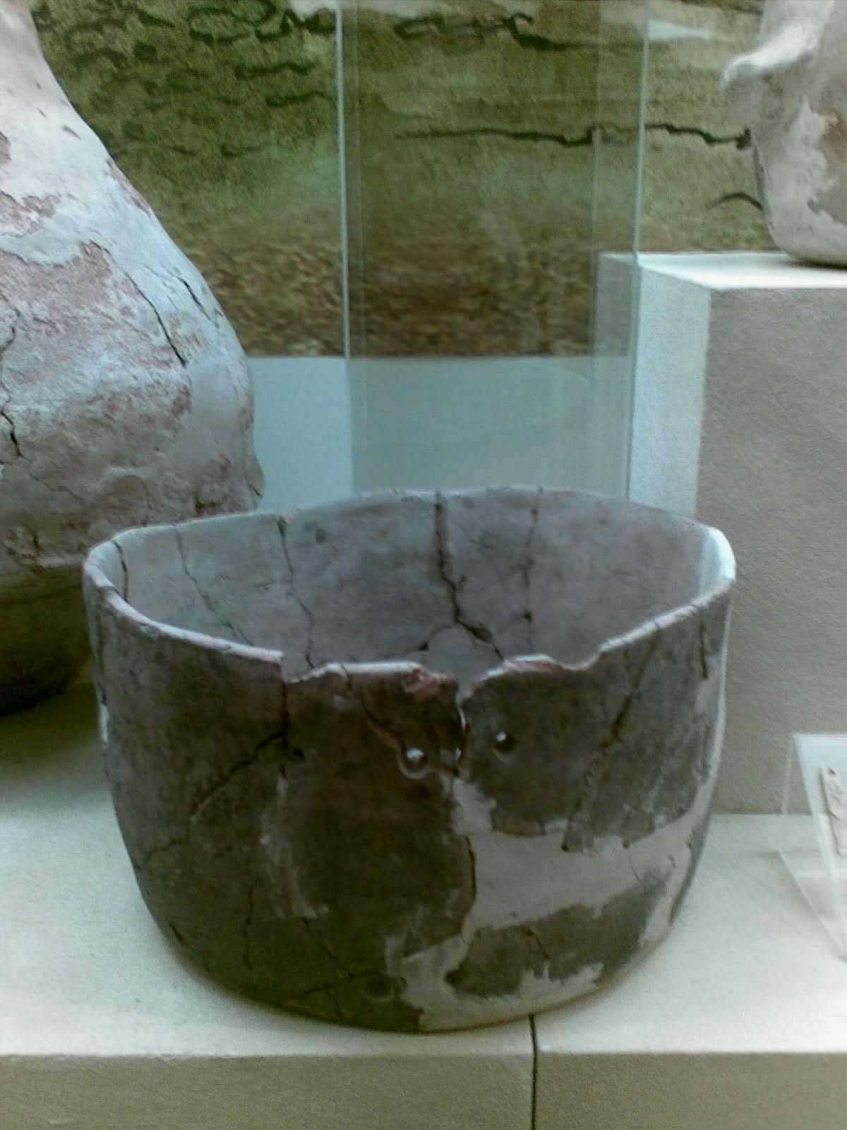 Əliköməktəpədən tapılmış saxsı qab Azərbaycan Milli Tarix Muzeyi